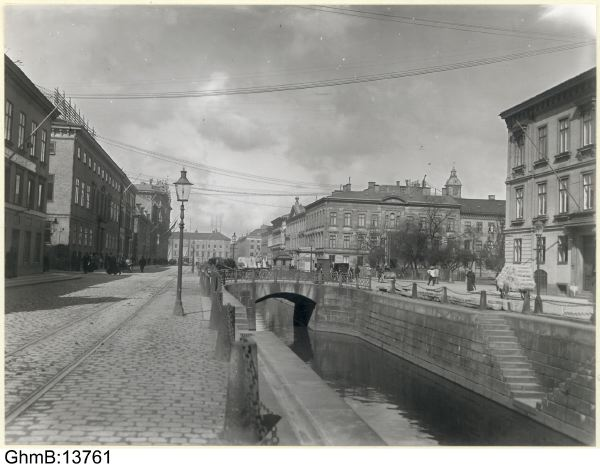 Västra Hamngatan mot norr från korsningen Vallgatan. Domkyrkoplan till höger. Bron är Västra Kungsgatubron.